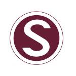 Das erste Logo des Servette Football Club